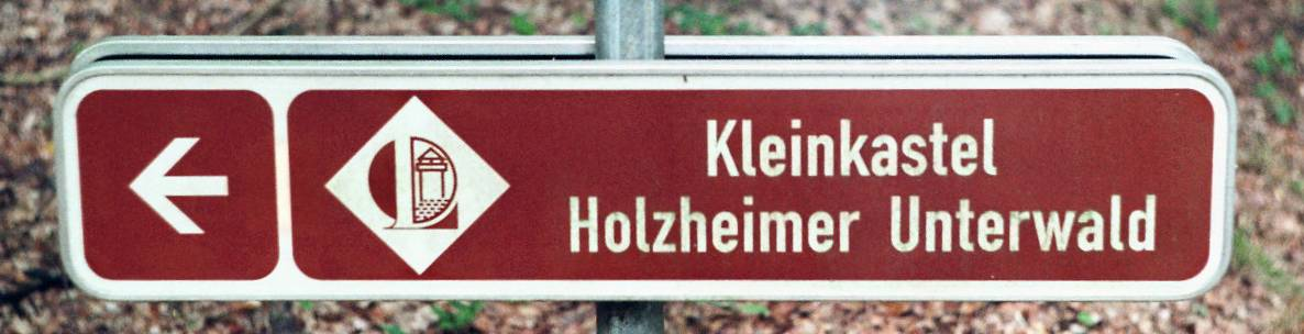 Römisches Kleinkastell am Obergermanisch-Raetischen Limes, Touristischer Hinweis, Falschschreibung